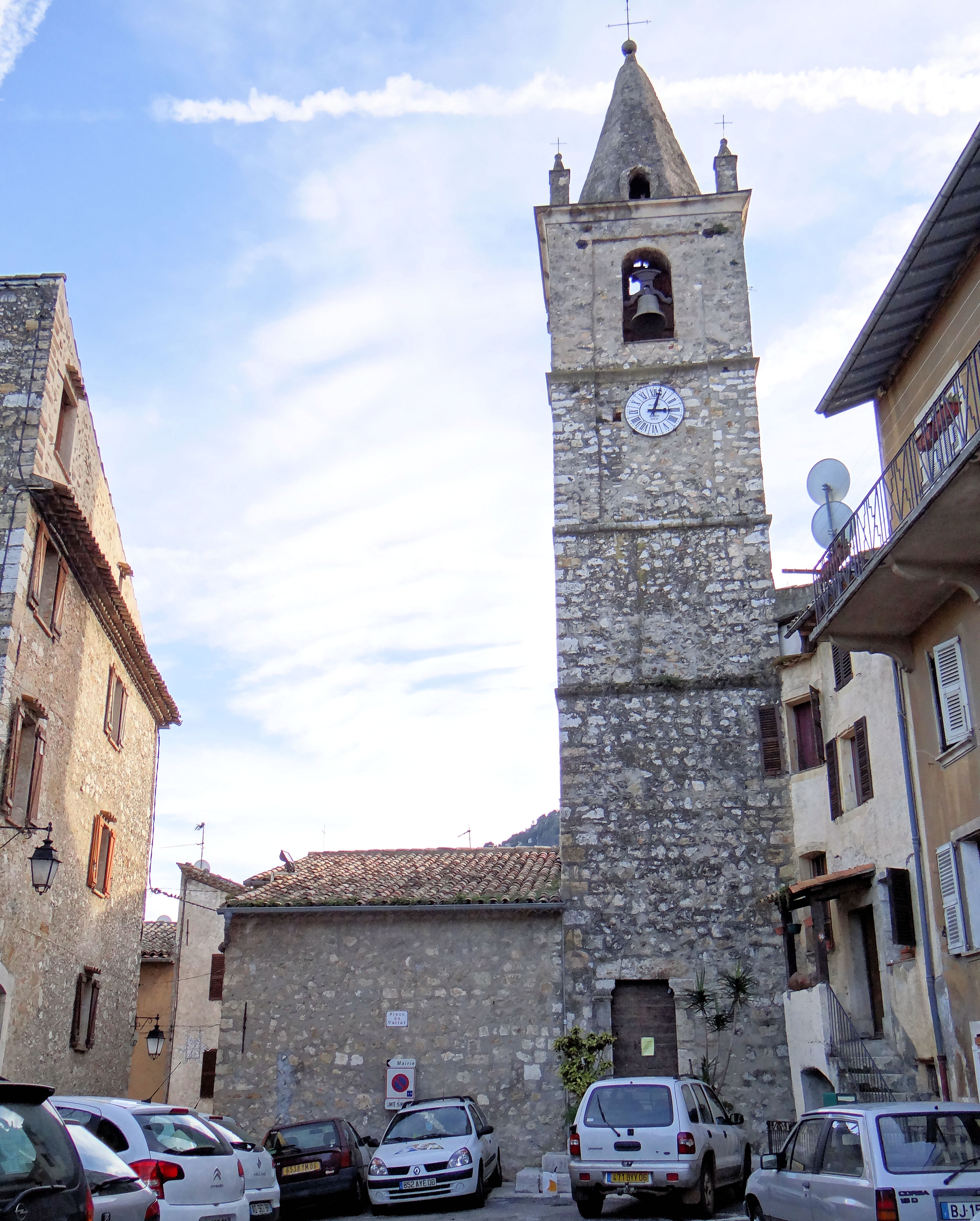 Le Broc - Église Sainte-Marie-Madeleine - Clocher